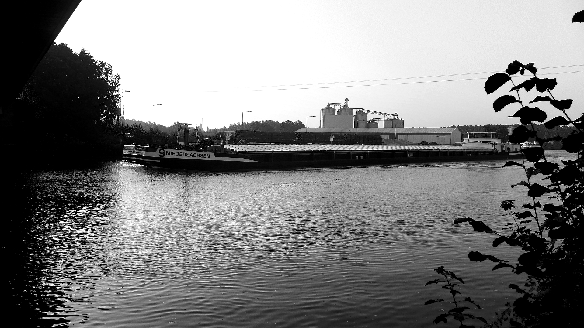 Binnenschiff "Niedersachsen 9" passiert auf dem Elbe-Seitenkanal den Wittinger Hafen. Eigner: Niedersächsische Verfrachtungs-Gesellschaft mbH gemeldet in: Hannover Nationalität: DE Europa-Nr. 04002180 MMSI-Nr.: 211473580 Rufzeichen: DB3265